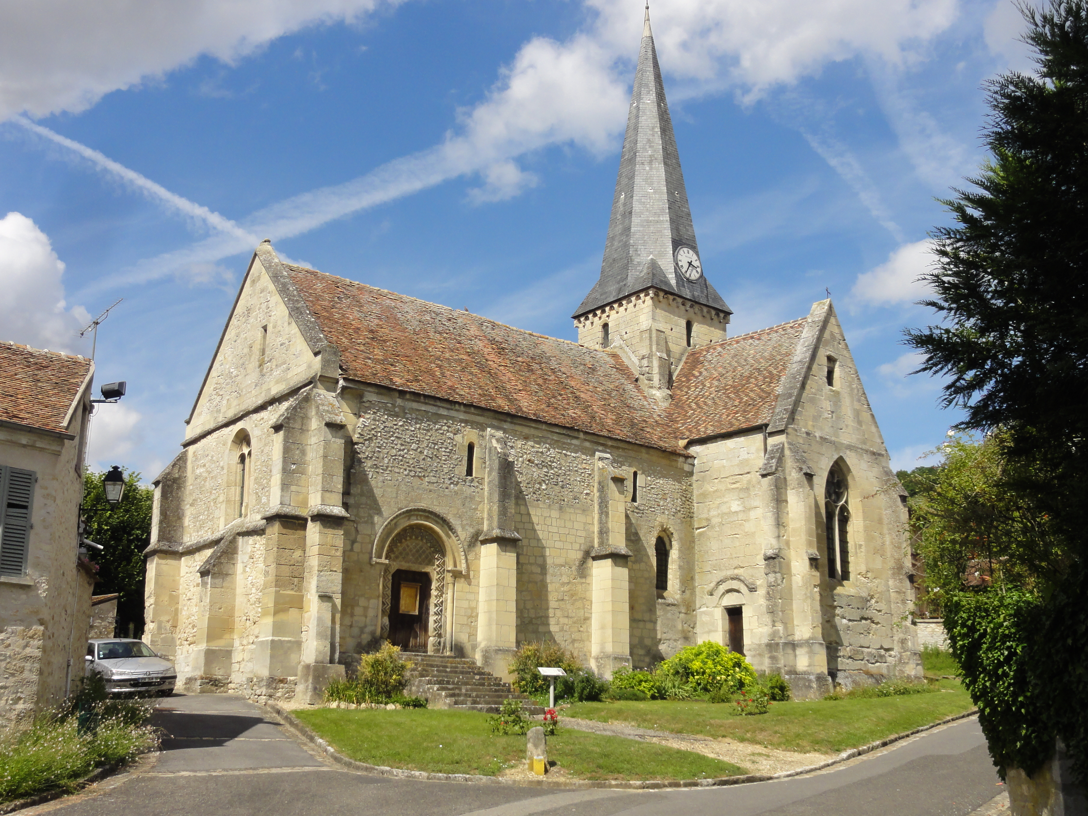 Église Saint-Pierre-aux-Liens-et-Saint-Étienne de Brignancourt.